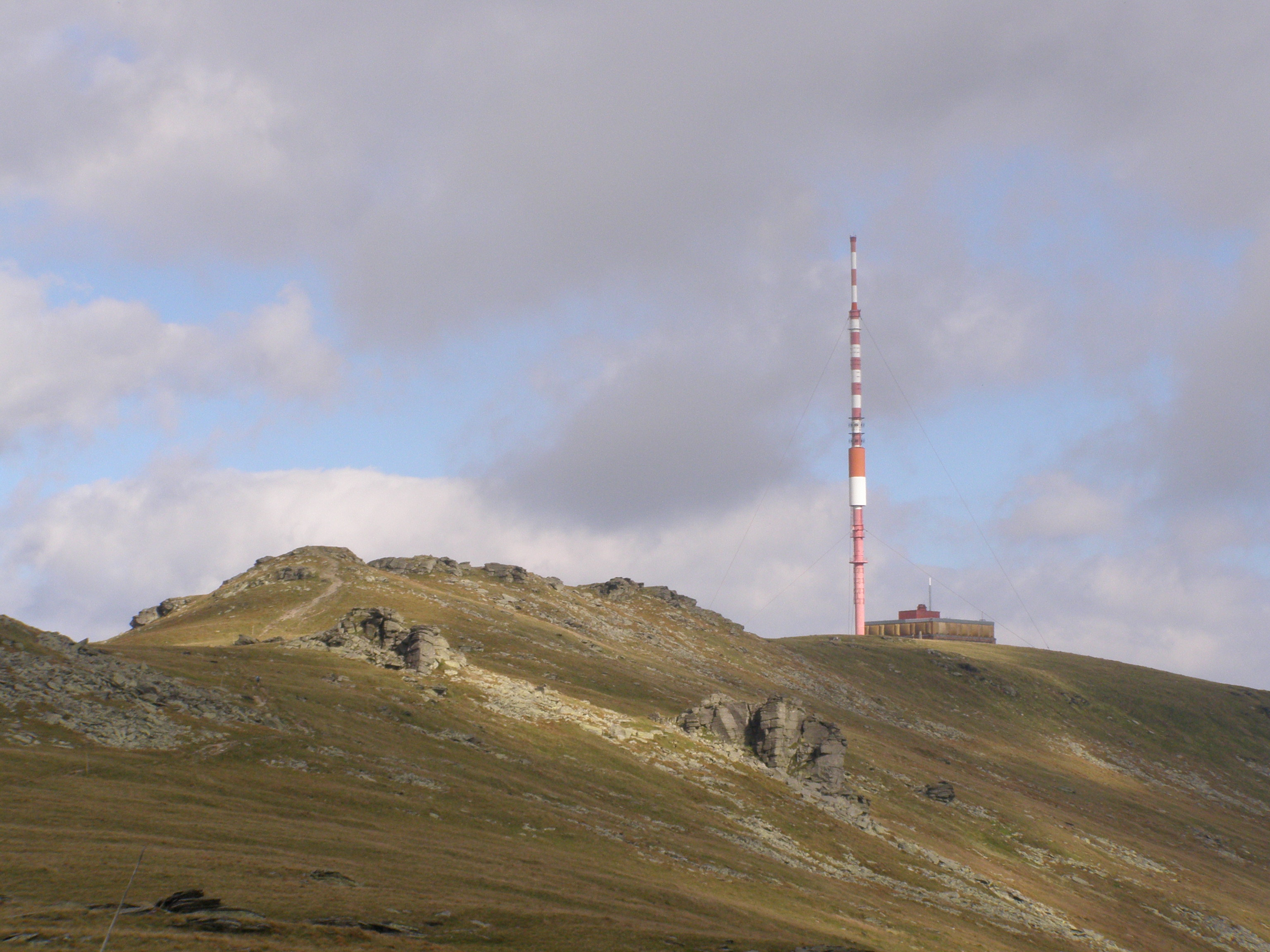 Nízké Tatry, Kráľovohoľské Tatry, vrchol Kráľova hoľa (1946 m) od západu